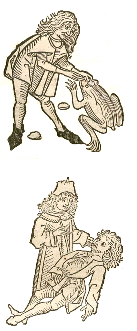 Abbildung von Borax/Krötenstein und Bezaar/Antidot